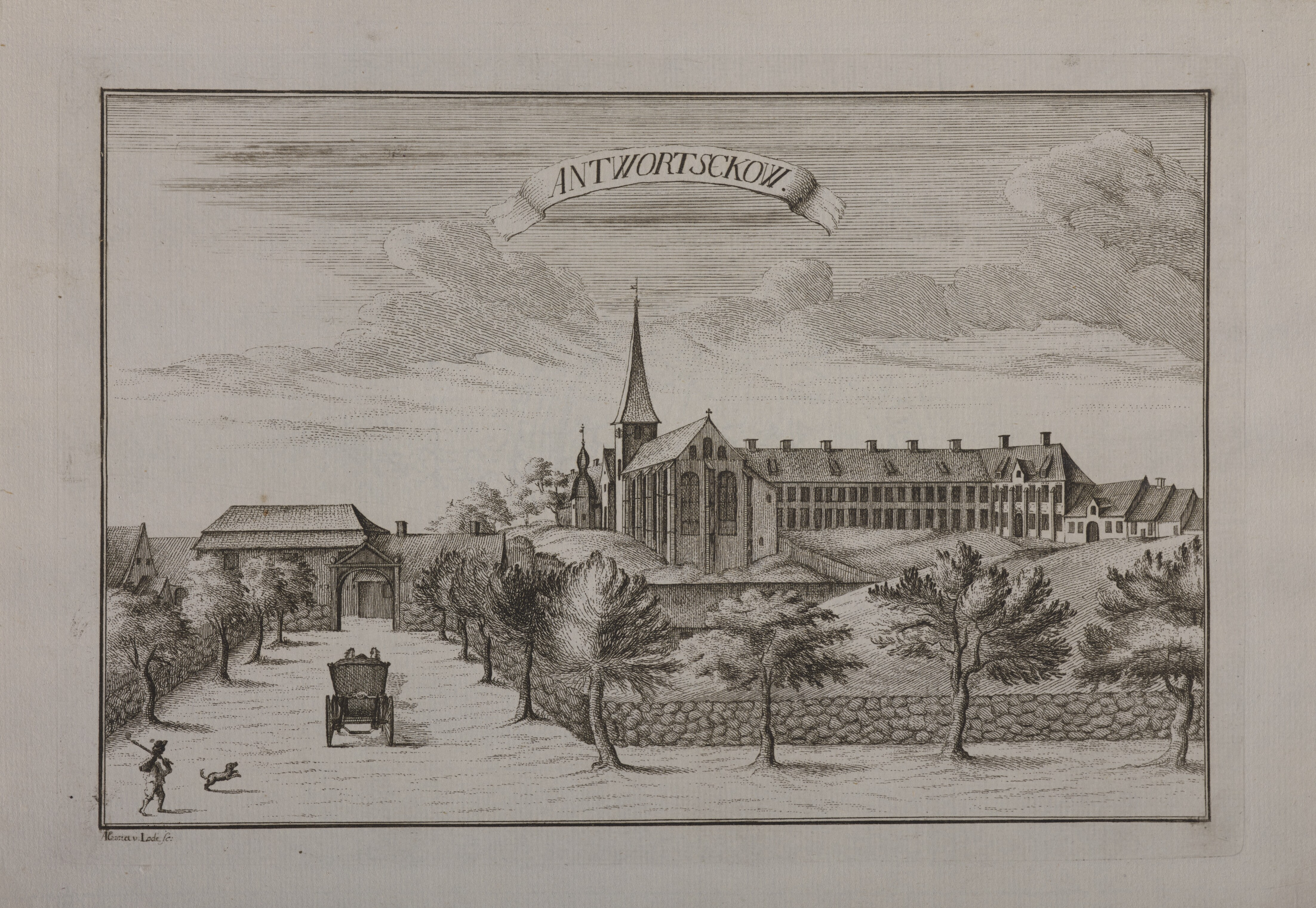 Antwortsckow, kobberstik af Lode, Alexia v.